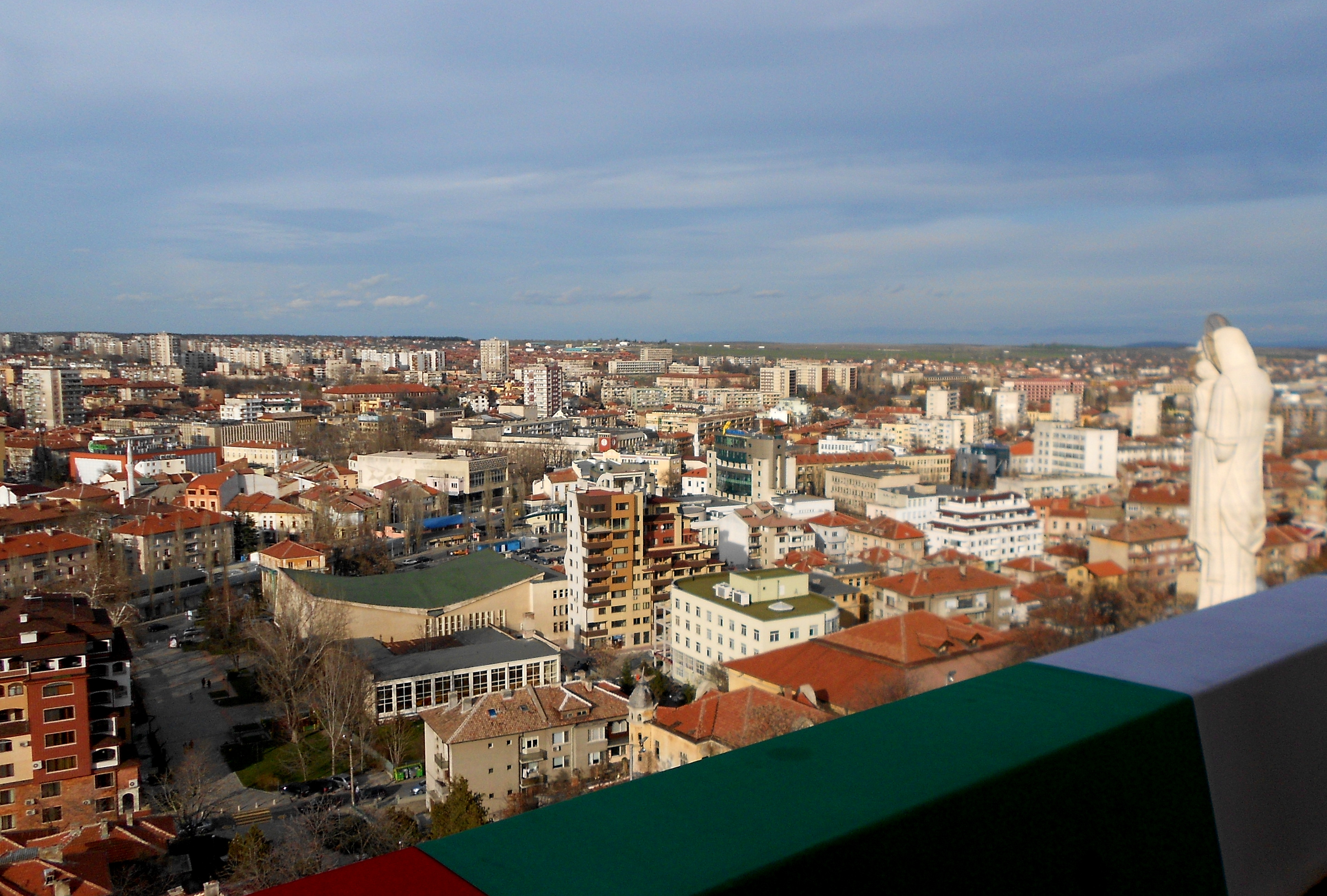 Изглед от Камбанарията в Хасково.